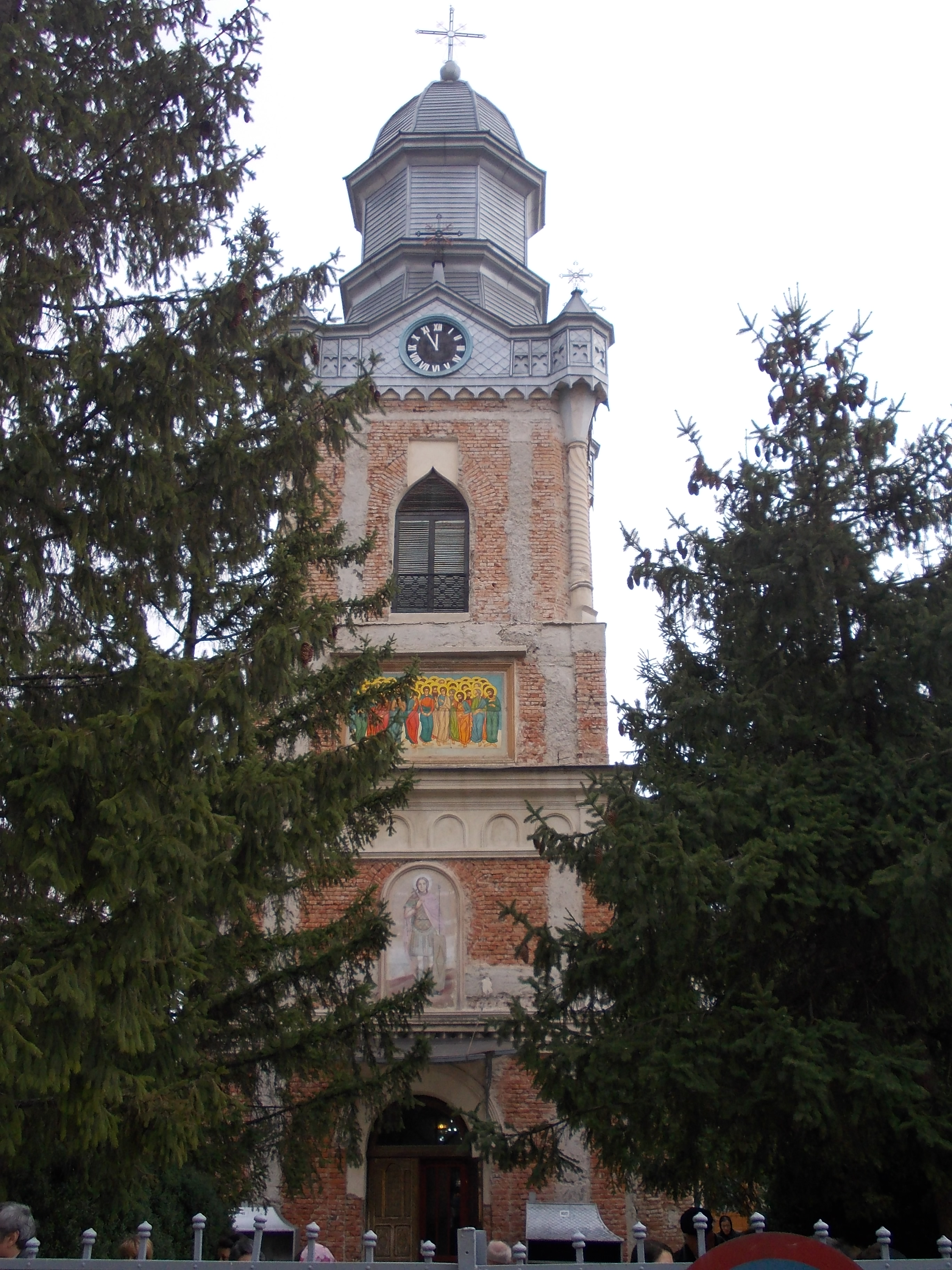 biserica Sf Dimitrie din Bârlad